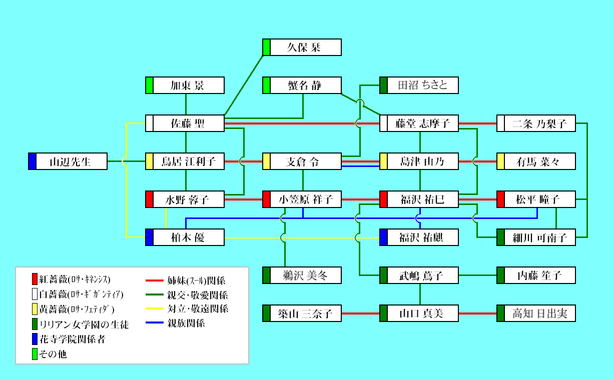 マリア様がみてるの人物相関図（日本語版）、マリア様がみてるの登場人物